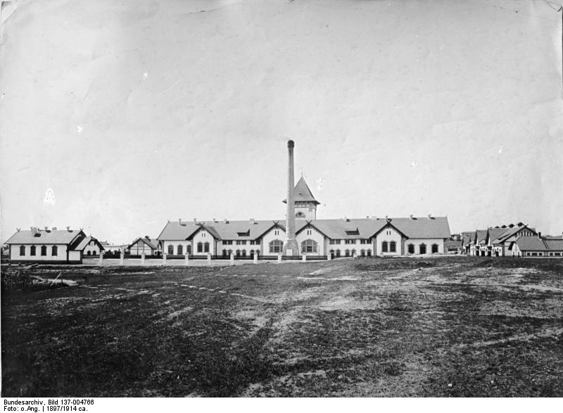 China, Tsingtau, Schlachthofneubau China, Tsingtau Schlachthofneubau